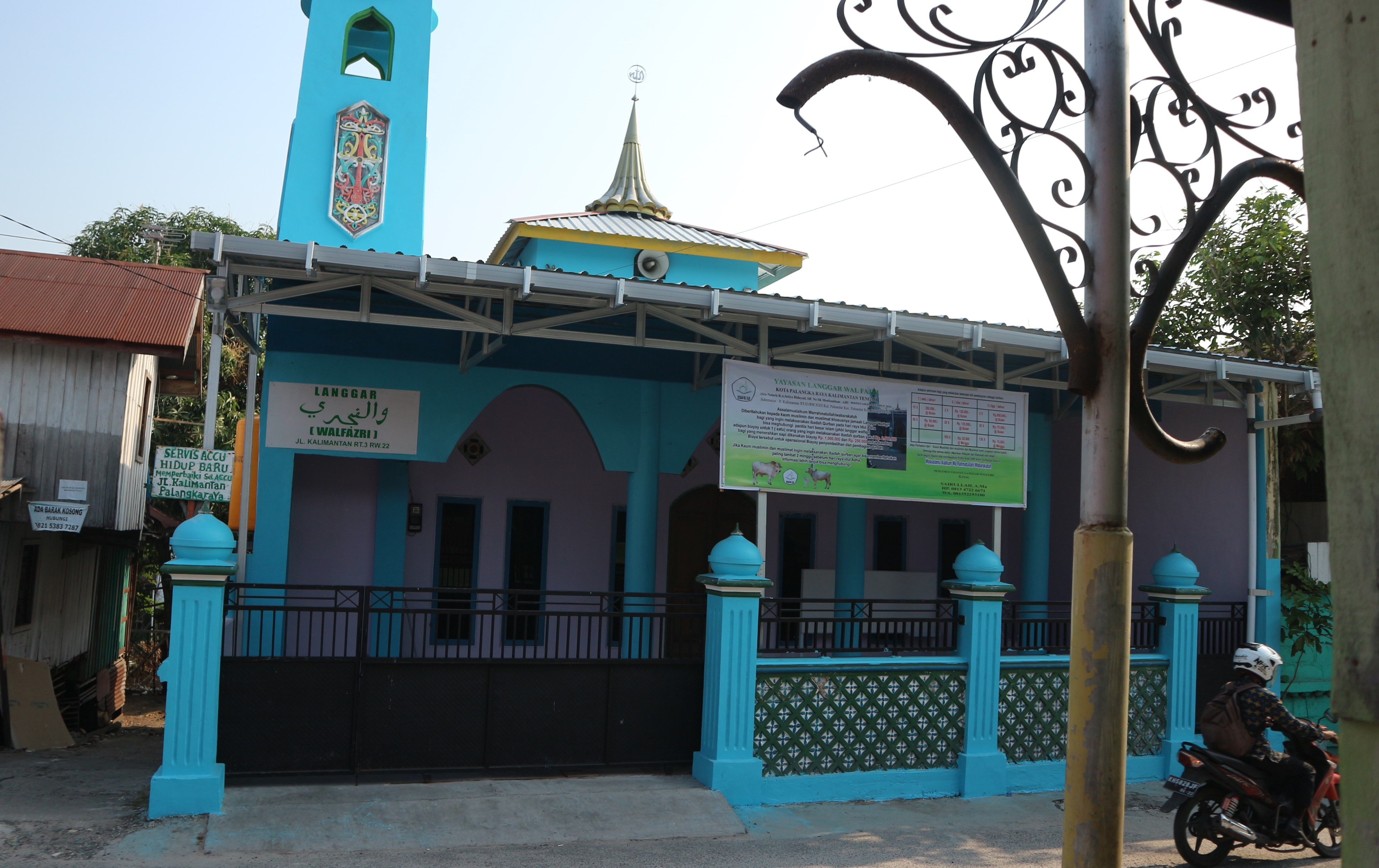 Surau Keluarga Ngabe Soekah